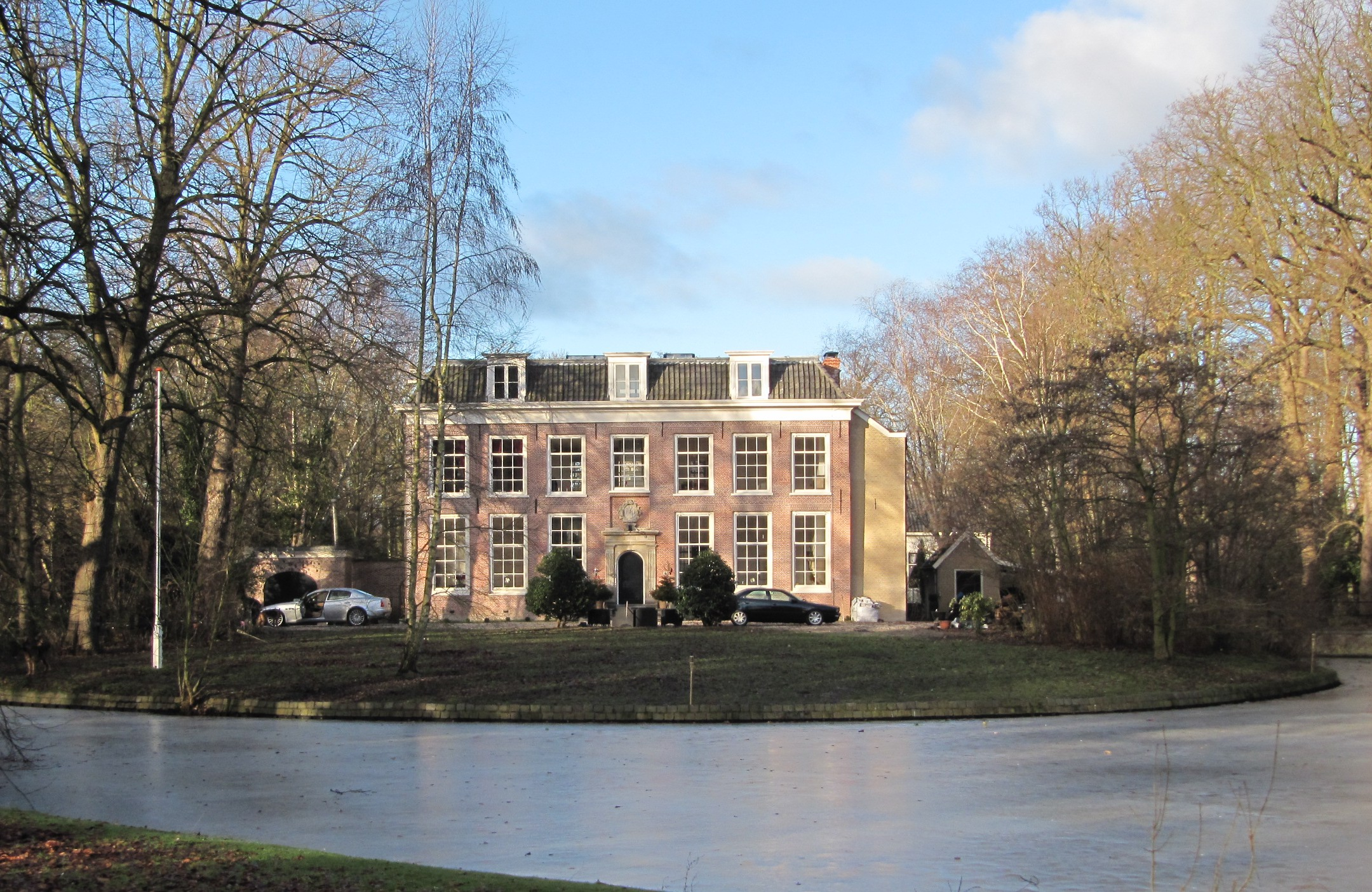 RM20085 Rijswijk - Van Vredenburchweg (Overvoorde, foto 1).jpg